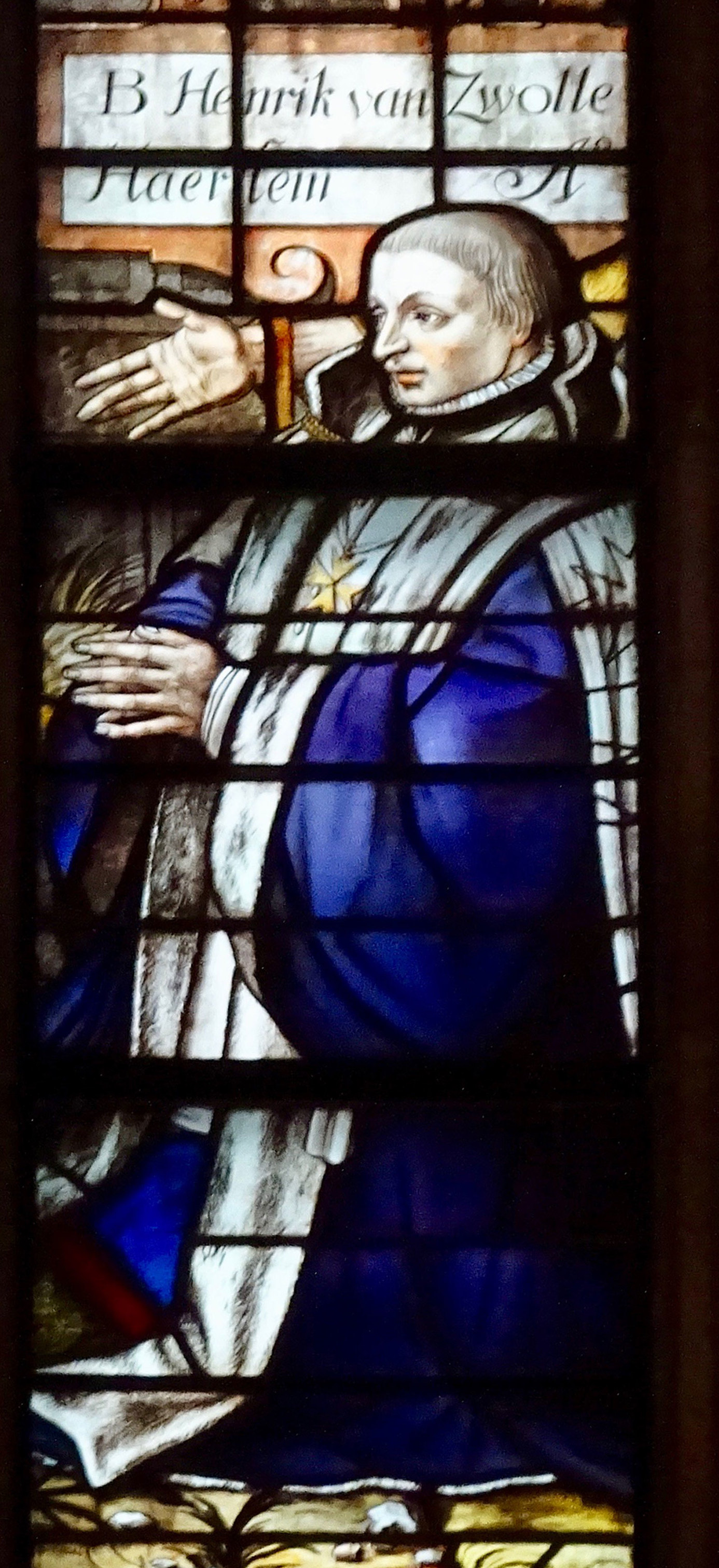 Detail glas 19 Sint Janskerk Gouda met een afbeelding van Hendrik van Zwolle, schenker van het glas